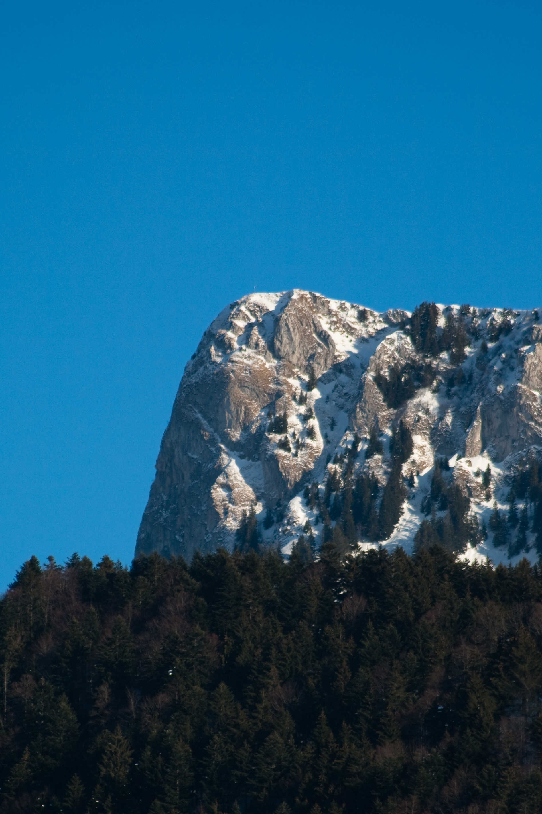 La Dent du bourgo au-dessus de Gruyère en Suisse.